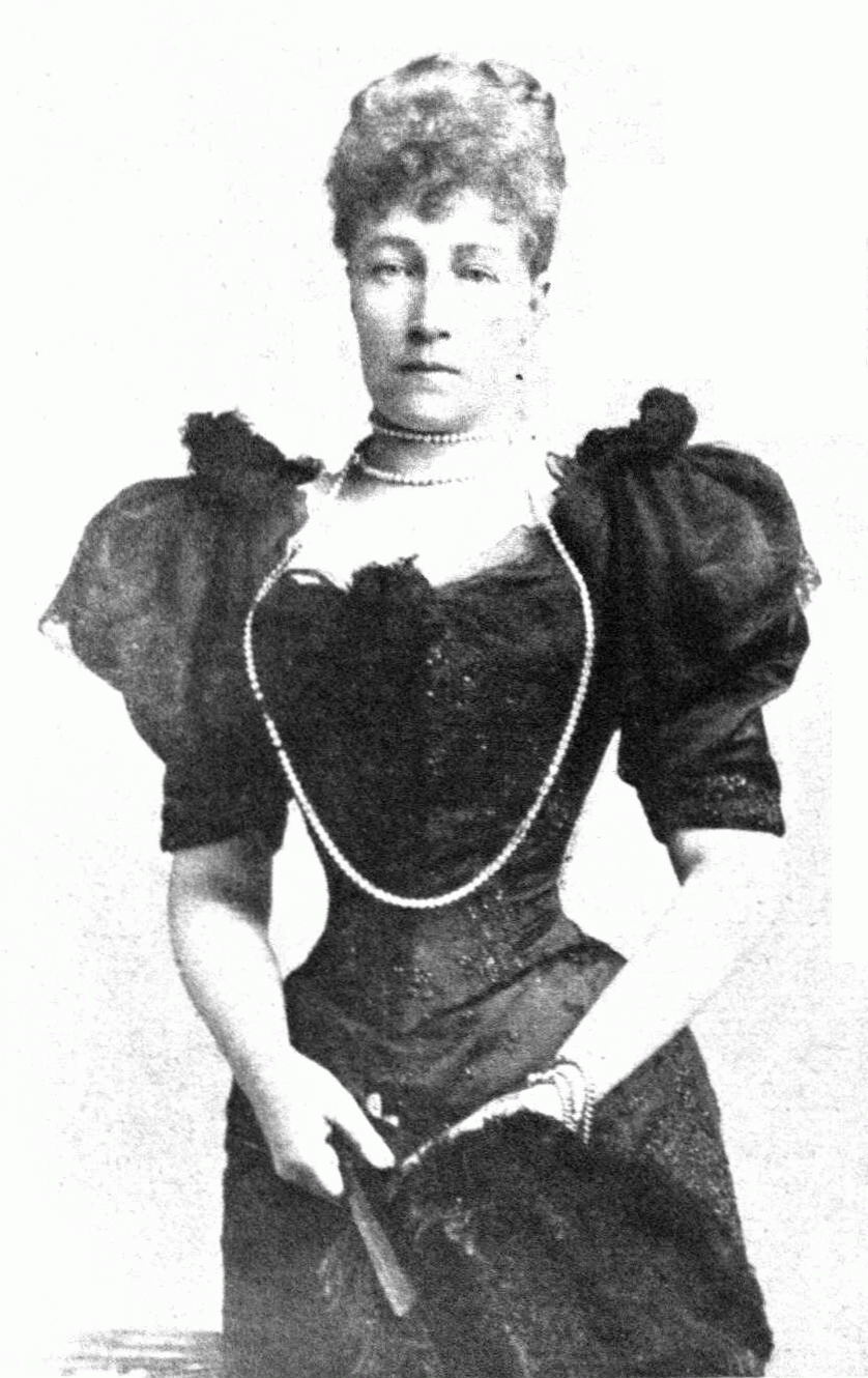 Stephanie von Belgien (1864-1945), Witwe von Kronprinz Rudolf (+ 1889), in zweiter Ehe am 22. März 1900 mit Elemér Lónyay verheiratet